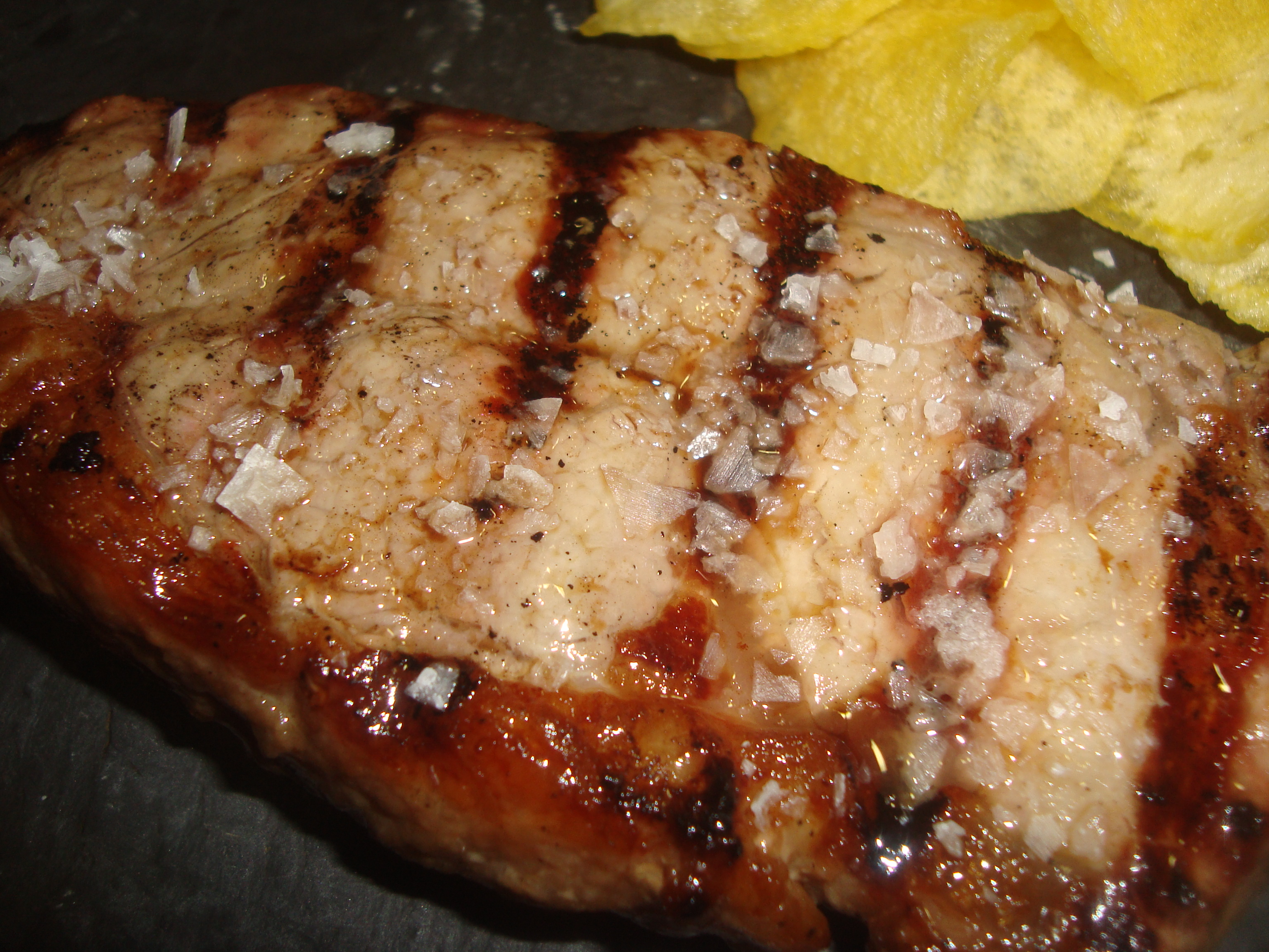 Entrecot de vedella a la graella assaonat amb escates de sal